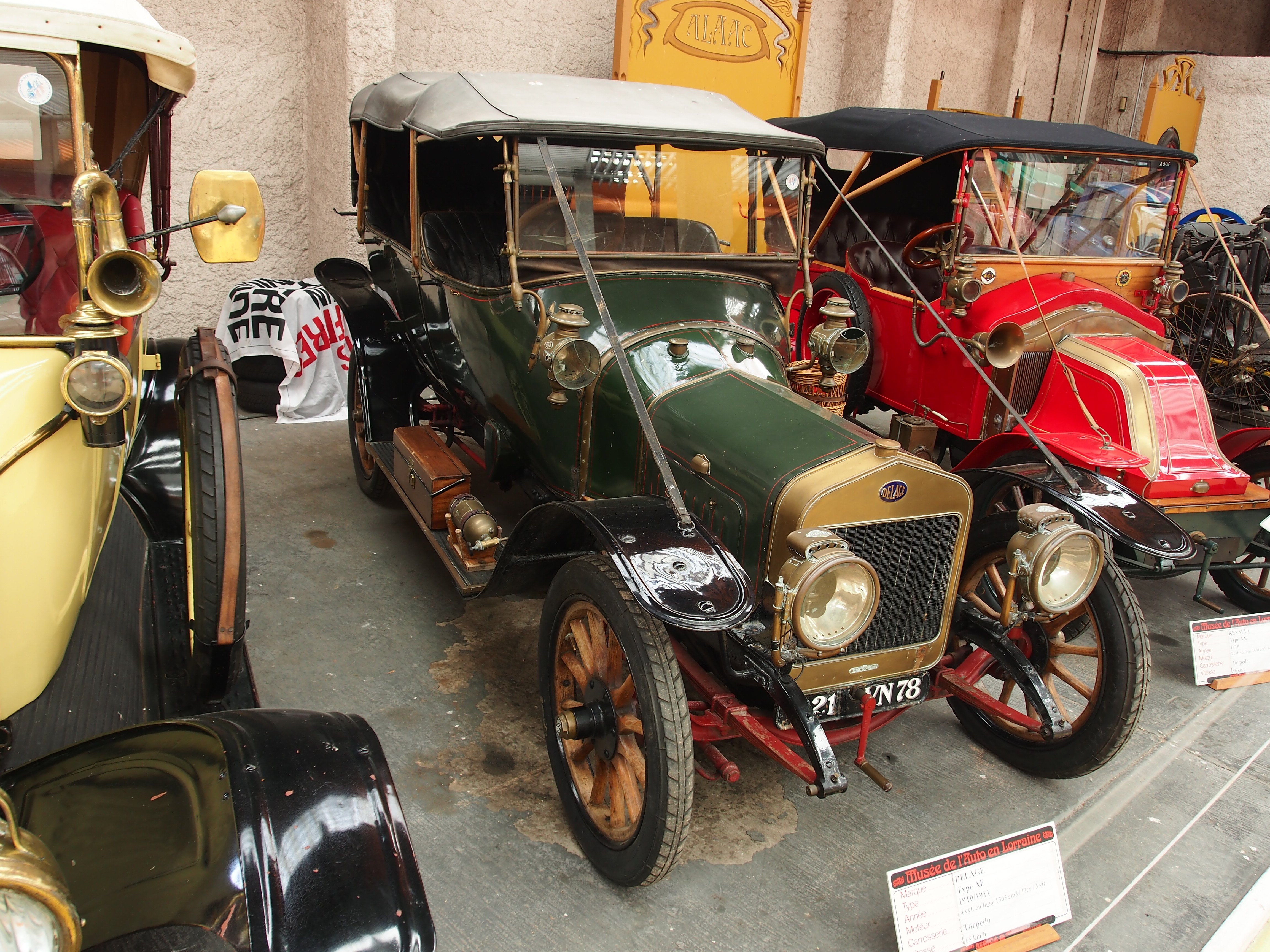 Photographed at the Association Lorraine des Amateurs d'Automobiles de collection et de loisirs.